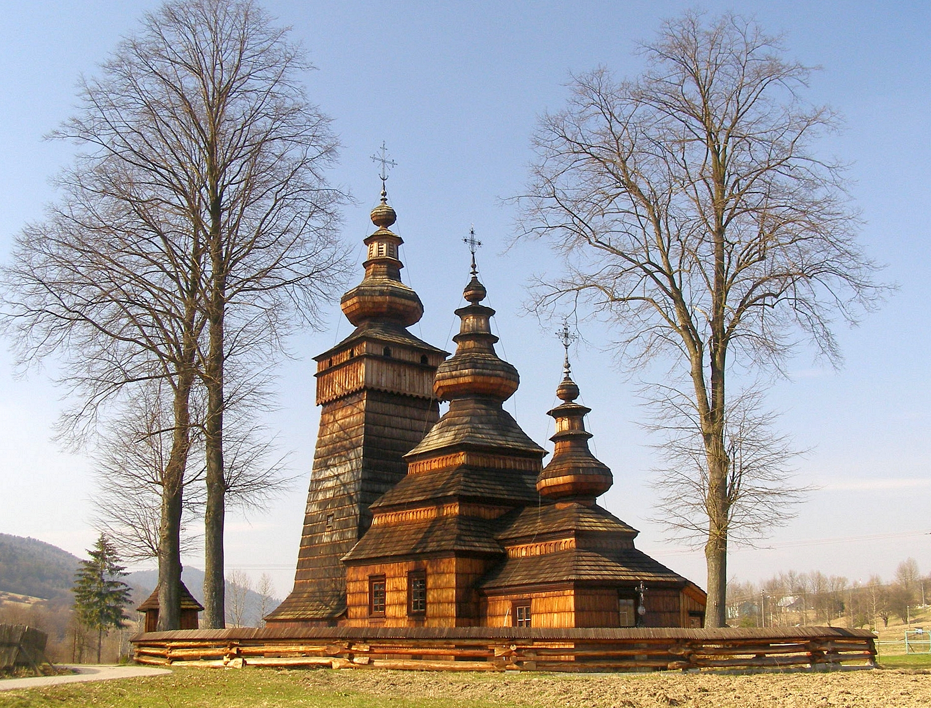 wieś Kwiatoń